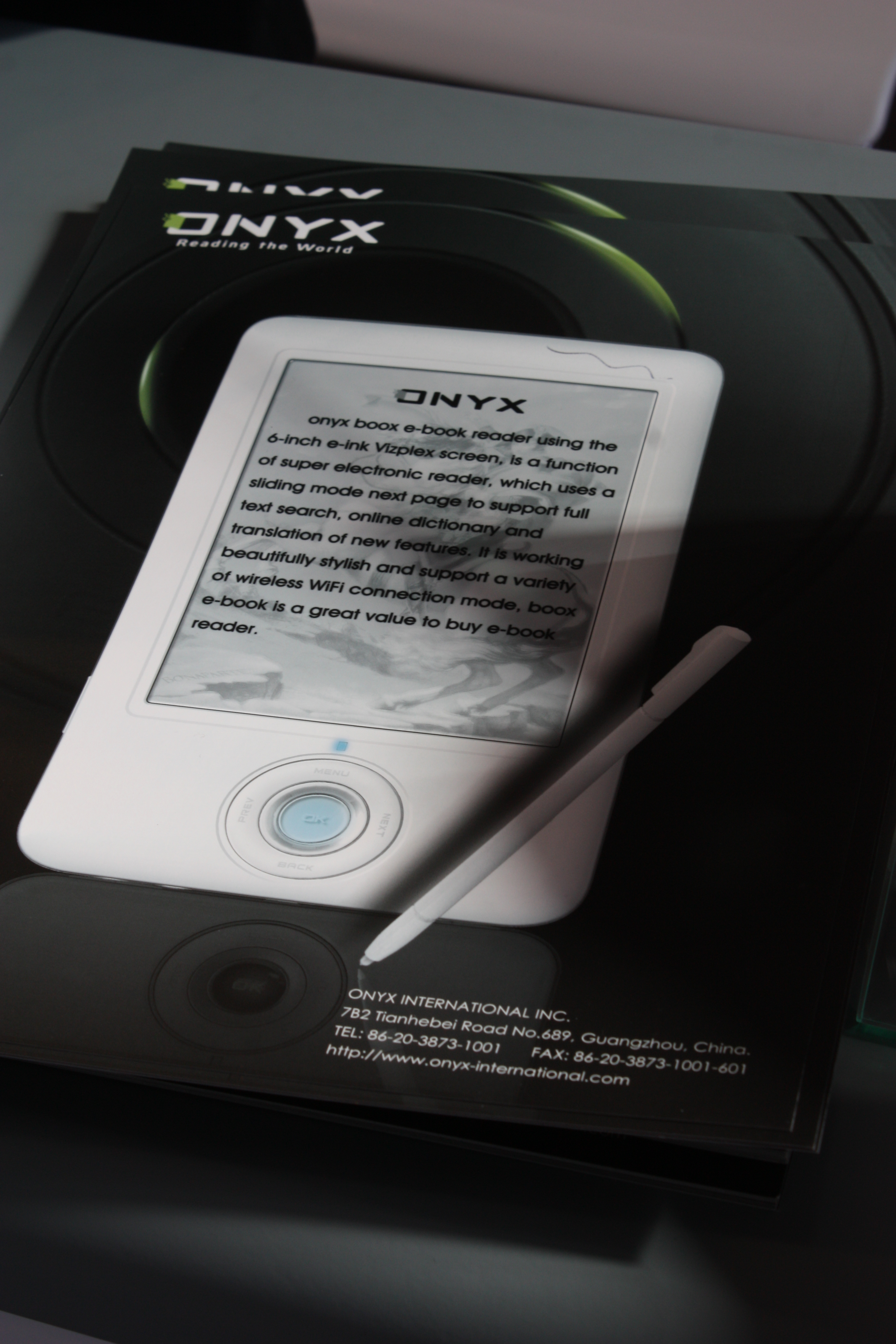 IFA 2010, Berlin